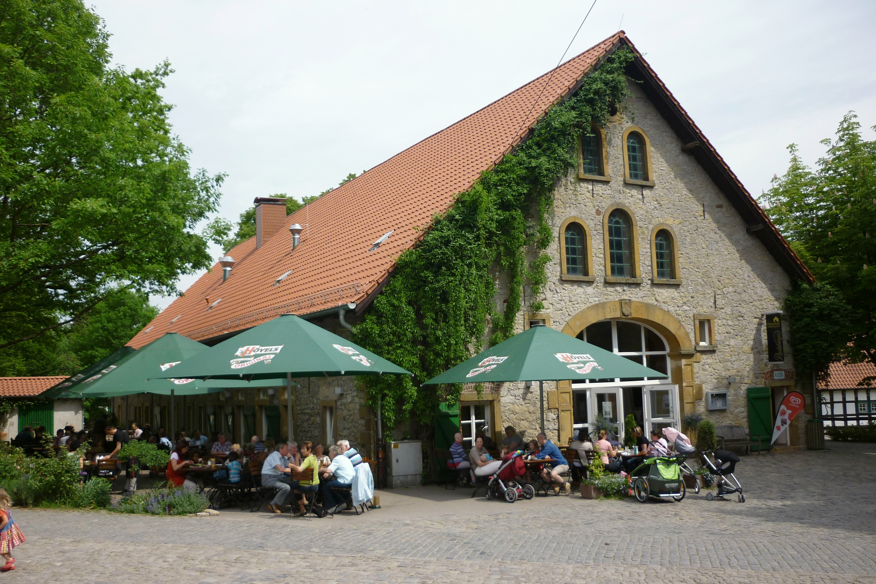 Bielefeld, Heimat-Tierpark. Gaststätte "Meierhof Olderdissen".